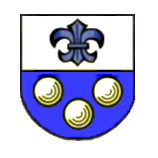 Das Wappen der Teilgemeinde Hürbel in Gutenzell-Hürbel, Germany, Baden-Württemberg